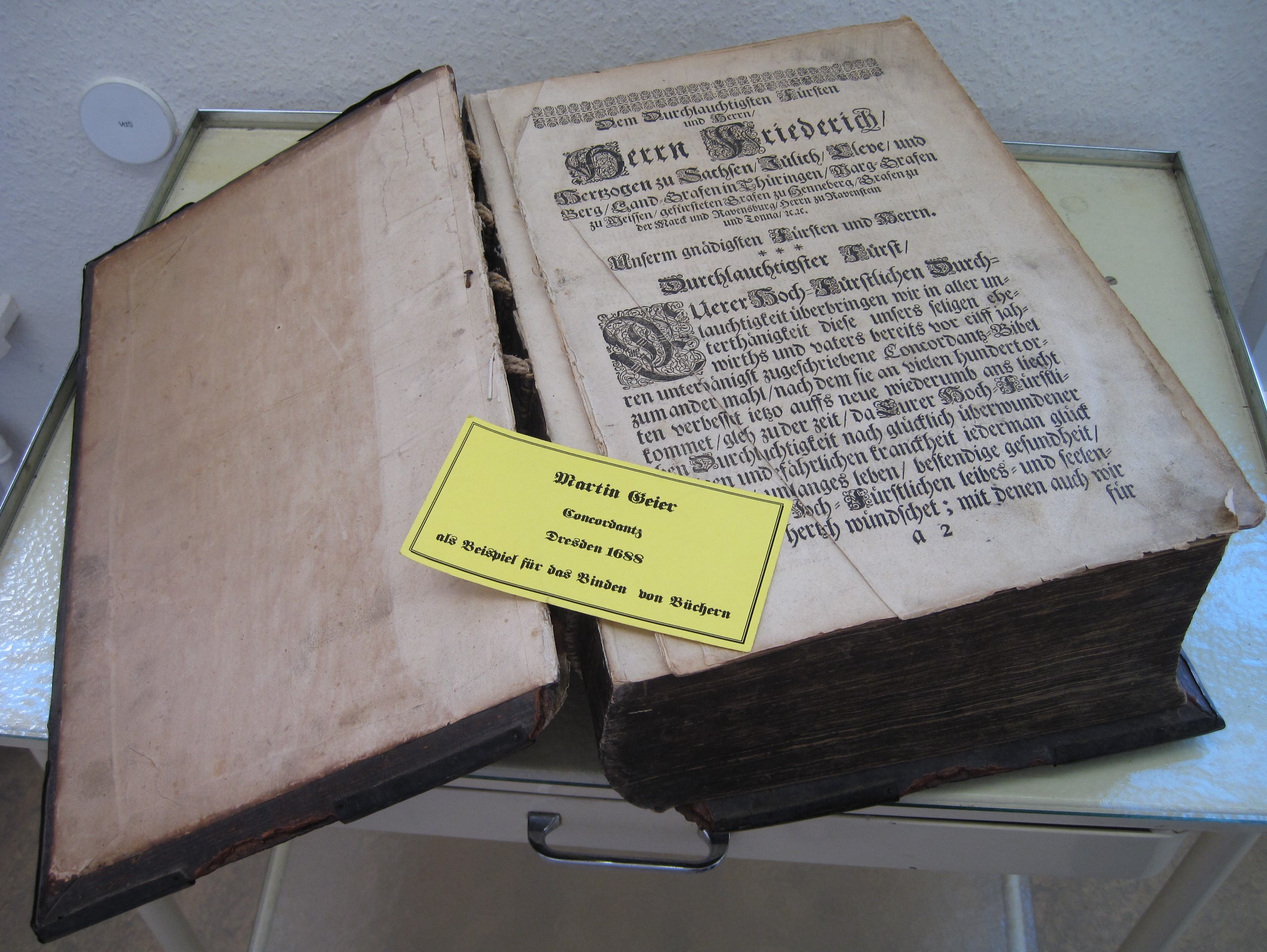 Martin Geier, Conkordantz, Dresden 1688. Als Beispiel für das Binden von Büchern ausgelegt in der Varnhagenschen Bibliothek in Iserlohn.